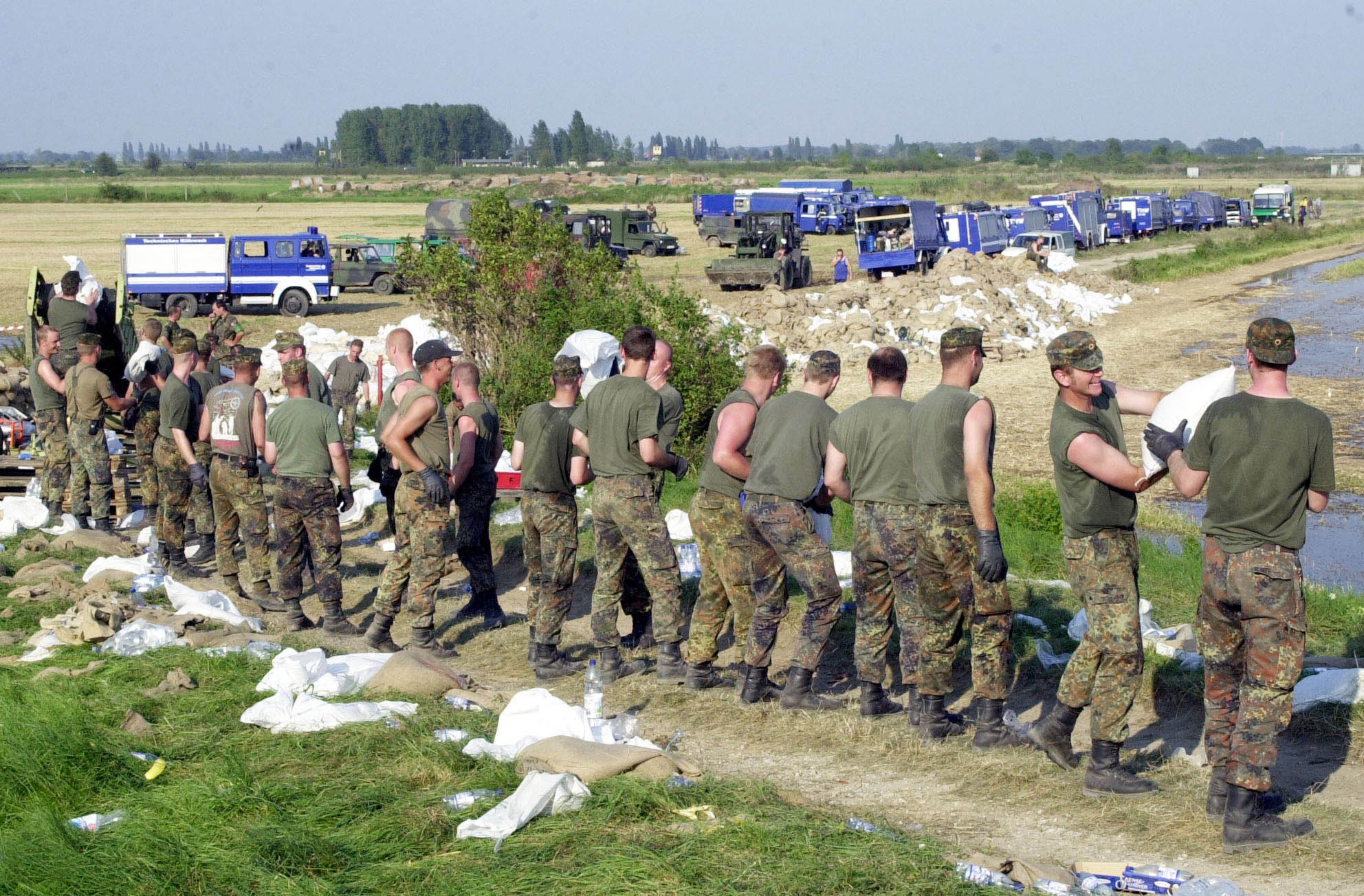 Soldaten der Bundeswehr und Angehörige des Technischen Hilfswerks (THW) sichern einen Deich im Einsatz gegen das Hochwasser im Magdeburger Stadtteil Pechau an der Elbe.